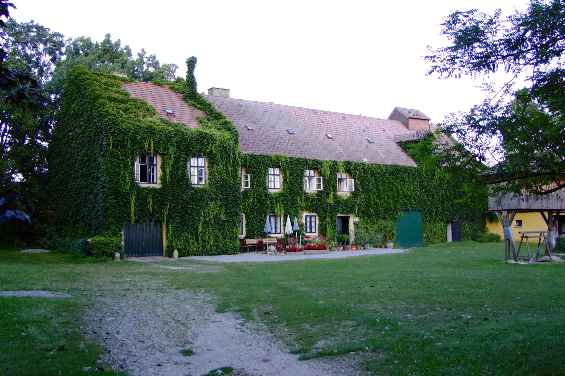 Ehemalige Mühle